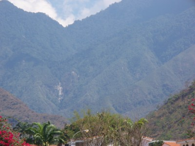 Cerro azul, Sur del Parque Nacional Henri Pittier, Maracay, Venezuela.